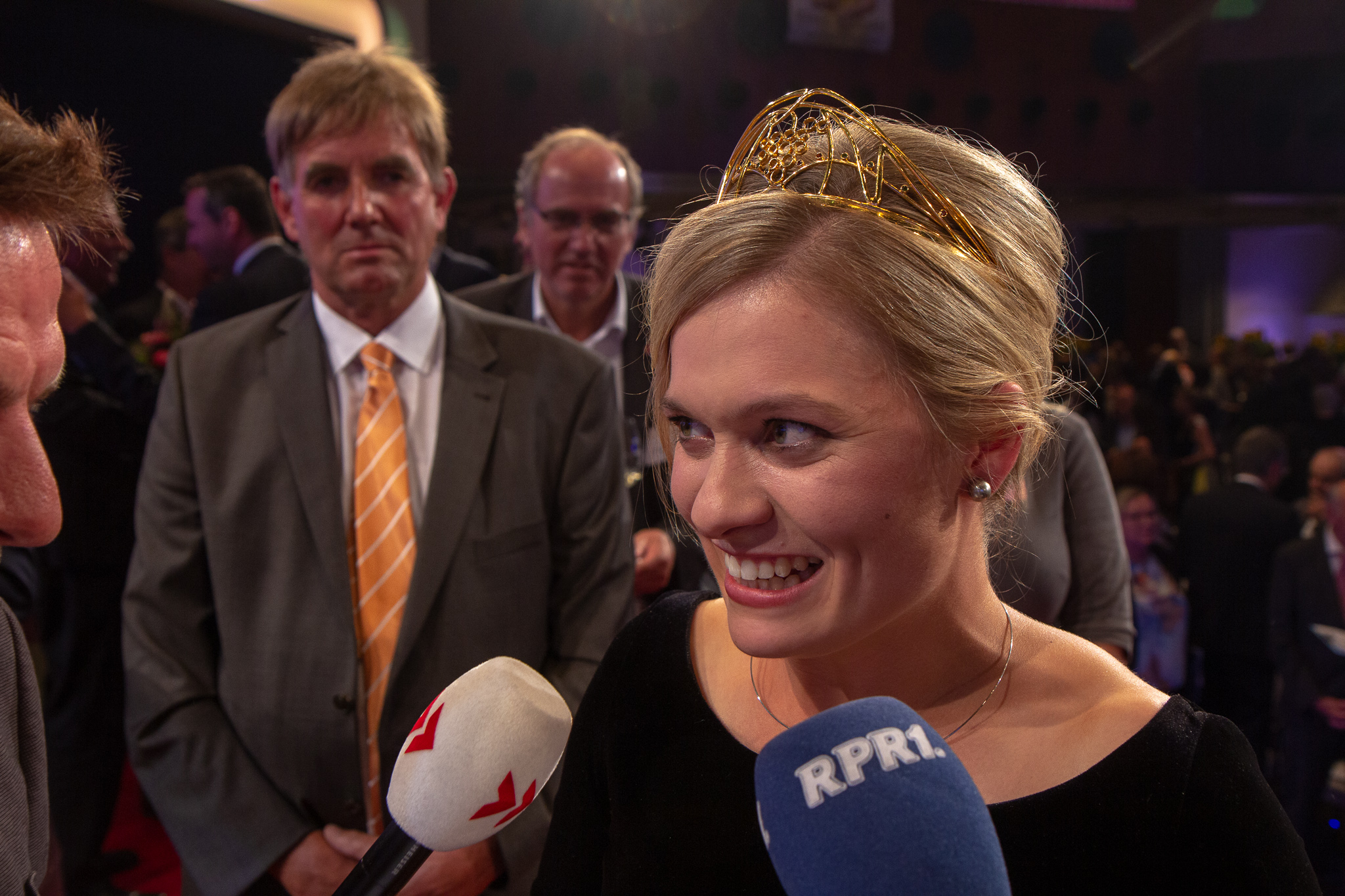 Wahl der 70. Deutschen Weinkönigin Carolin Klöckner am 28. September 2018 im Saalbau in Neustadt an der Weinstraße. Ehrengäste waren u.a. Julia Klöckner, (Bundeslandwirtschaftsministerin und Marc Weigel, Bürgermeister von Neustadt.